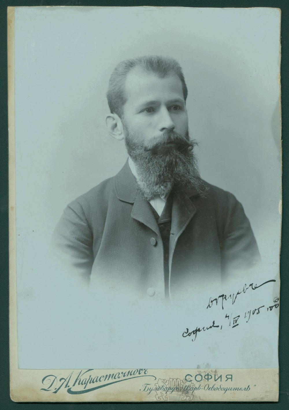 Dame Gruev, revolucionario macedonio.